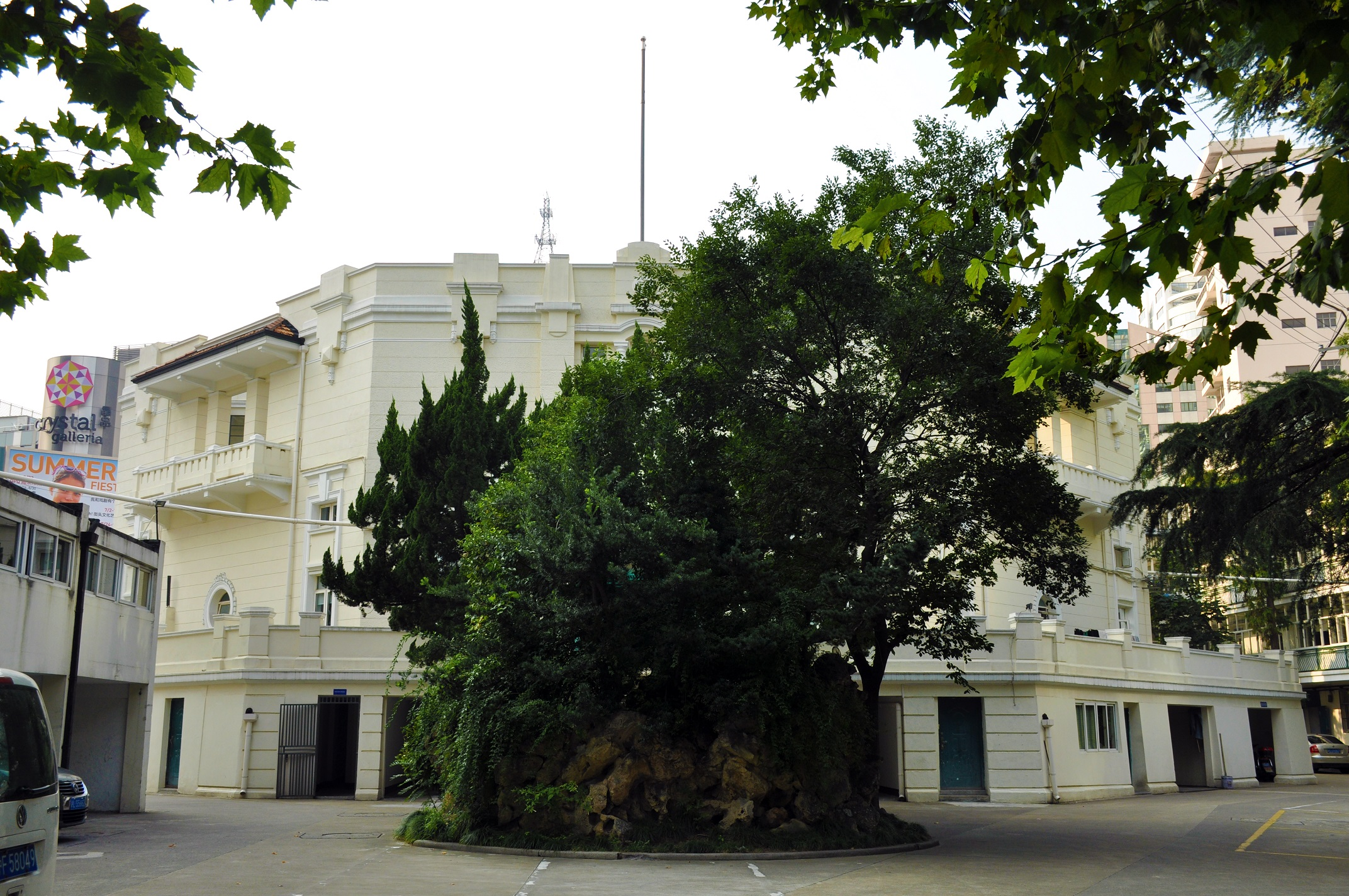 上海市公安局静安区分局交通警察支队 南京西路1550号